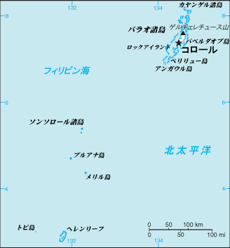 パラオの地図(日本語) Map of Parau(ja)